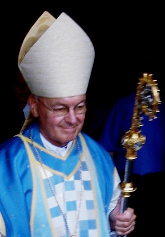 Bischof Heinz Josef Algermissen im Trutzhainer Wallfahtsmessgewand